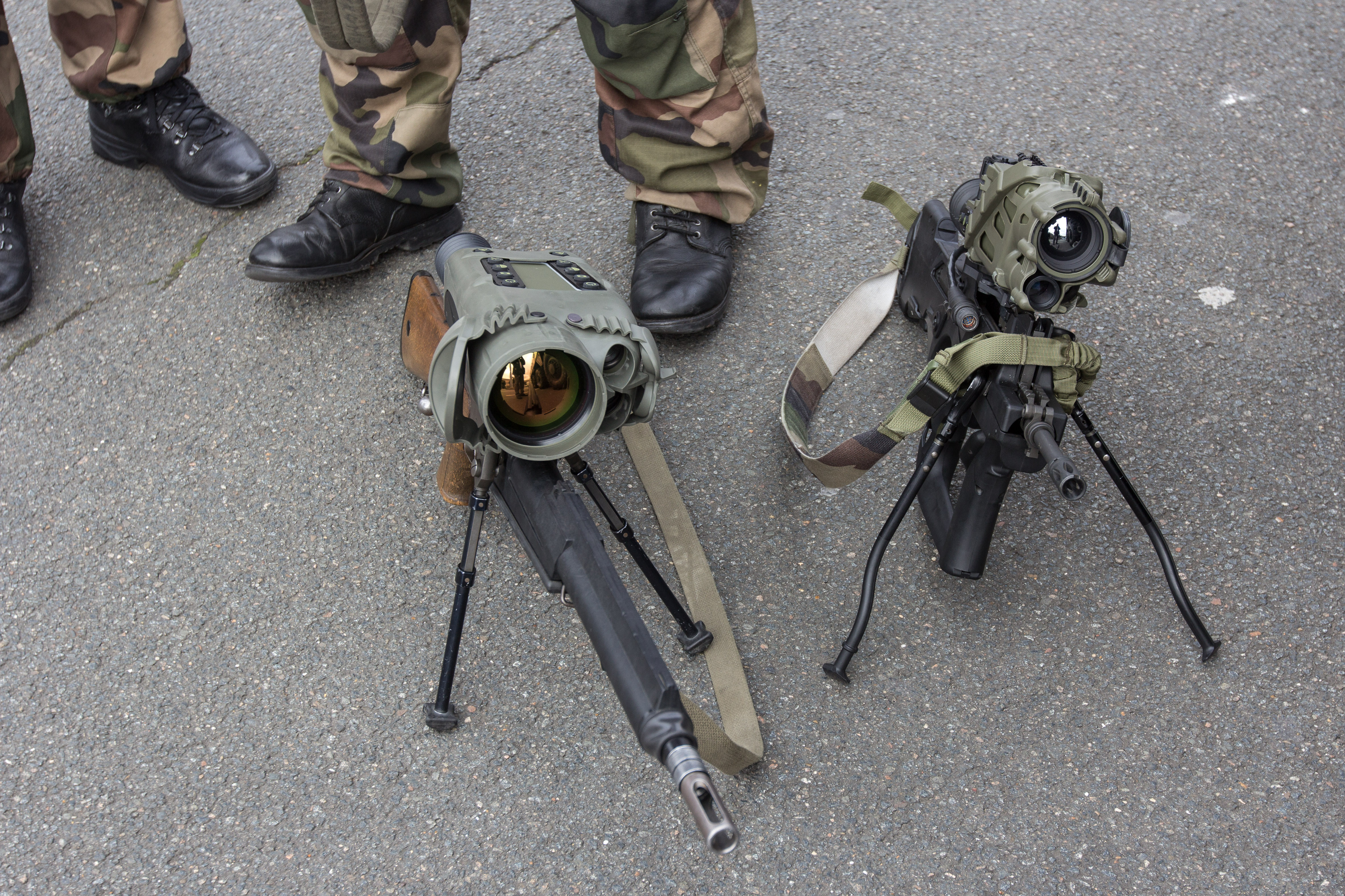 Matériel présenté lors de l'exposition "Les forces armées s'invitent à villabé", du 23 au 25 octobre 2014 au Centre commercial Villabé A6 / Villabé / Essonne / France